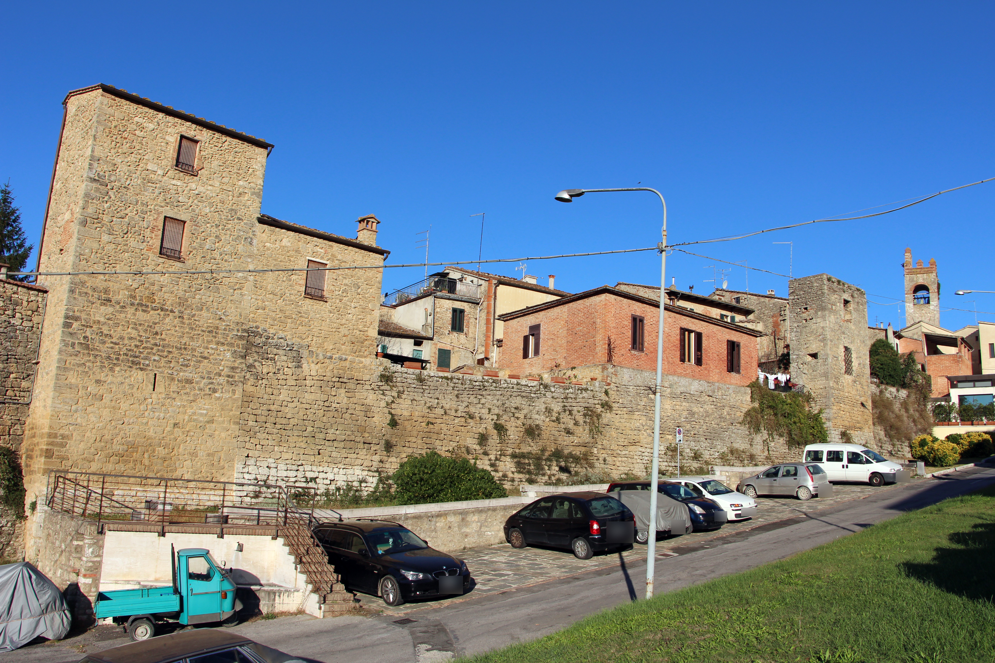 Asciano (SI)